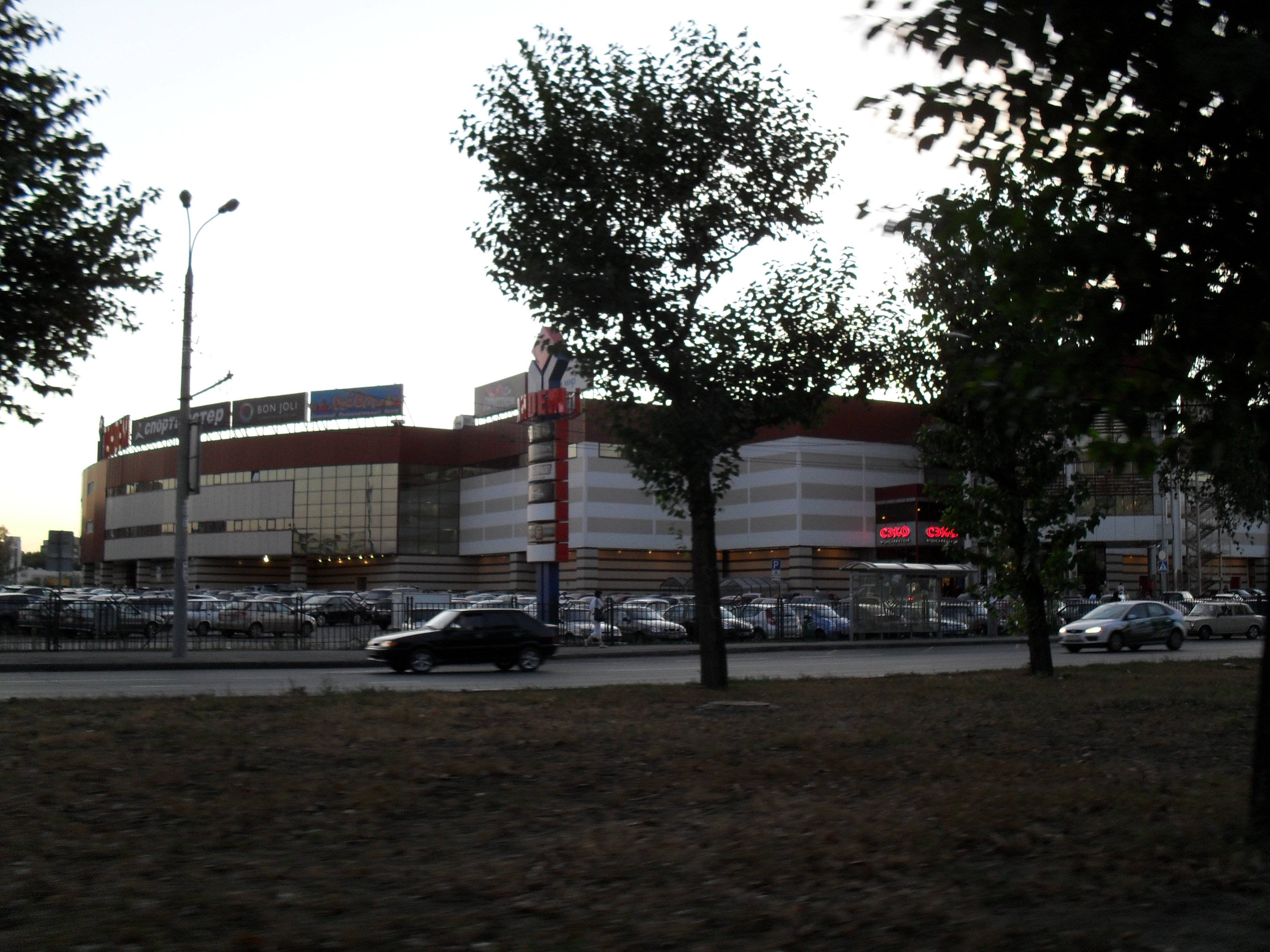 Торгово-развлекательный комплекс "Тандем", г. Казань. Вид со стороны пр. Ибрагимова